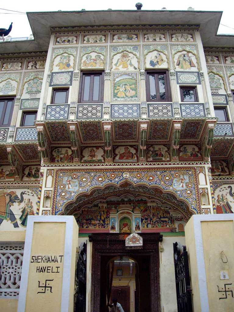 India (2007)